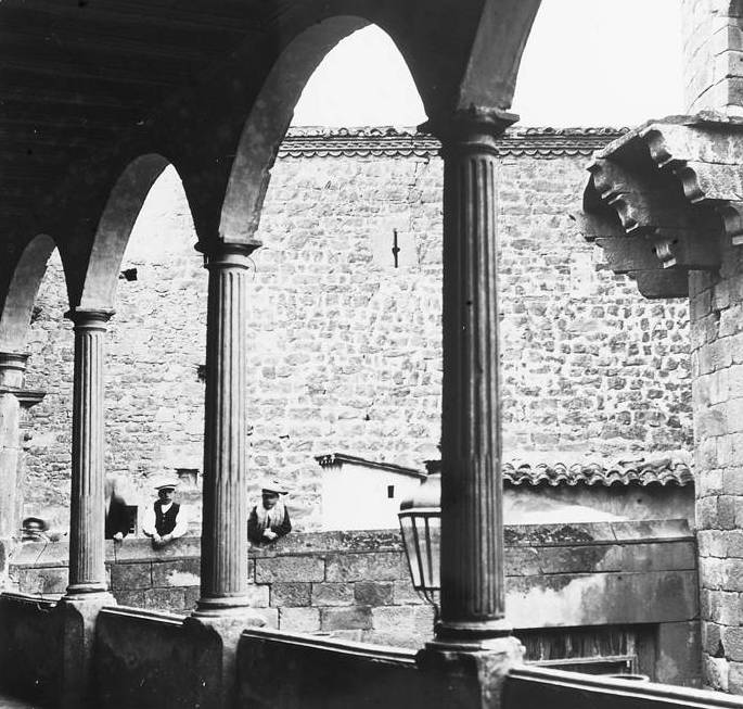 Galeria del castell de Verdú. Josep Salvany i Blanch (1913)